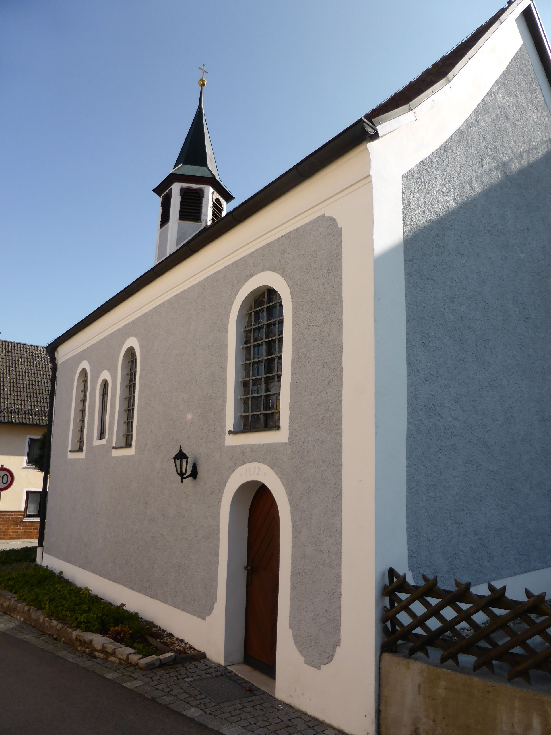 Hofmarksschloss Wischenhofen